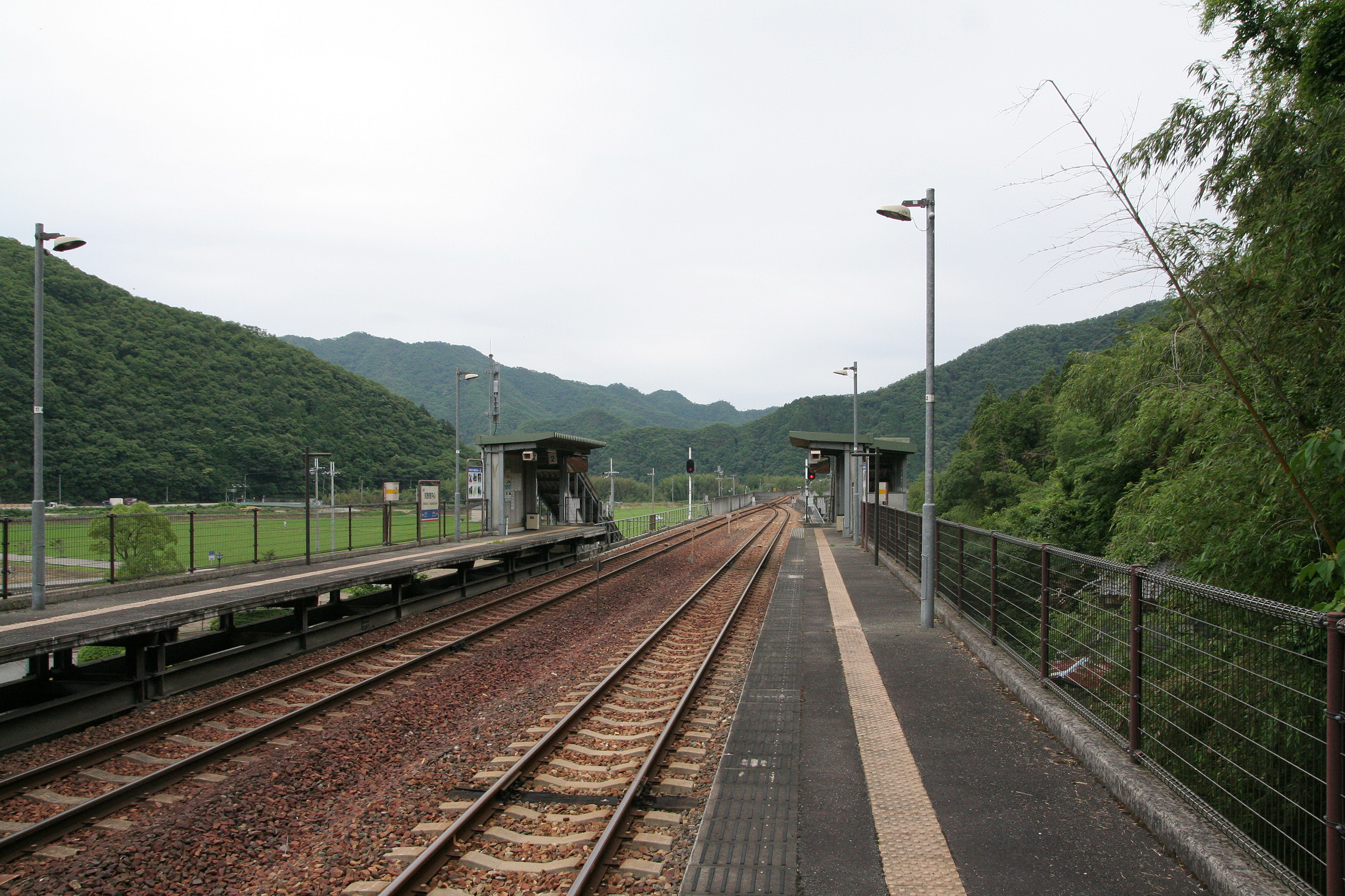 智頭急行 河野原円心駅の構内